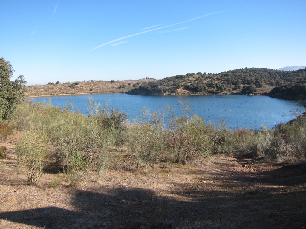 Laguna Grande